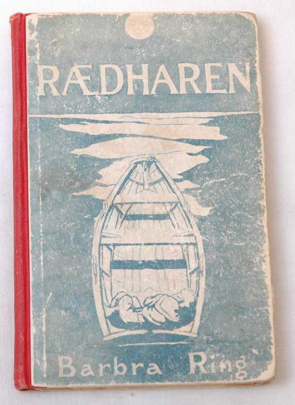 Rædharen av Barbra Ring. Utgitt av Det Mallingske bogtrykkeri i 1913.